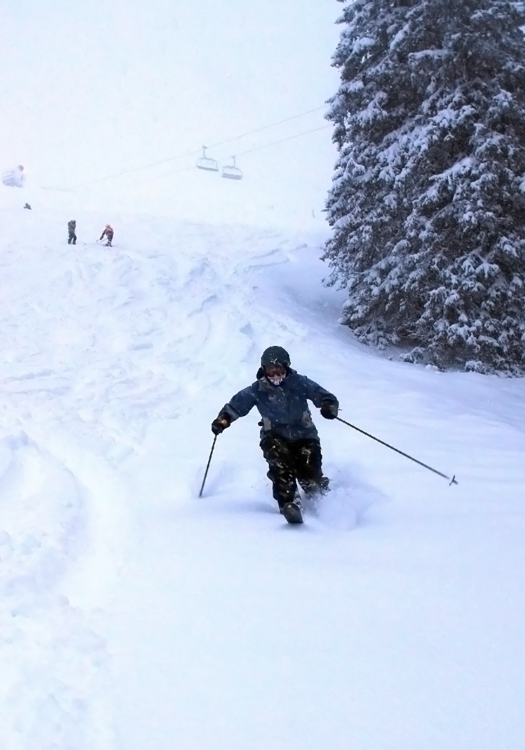 Skier in Kvittfjell, Norway.